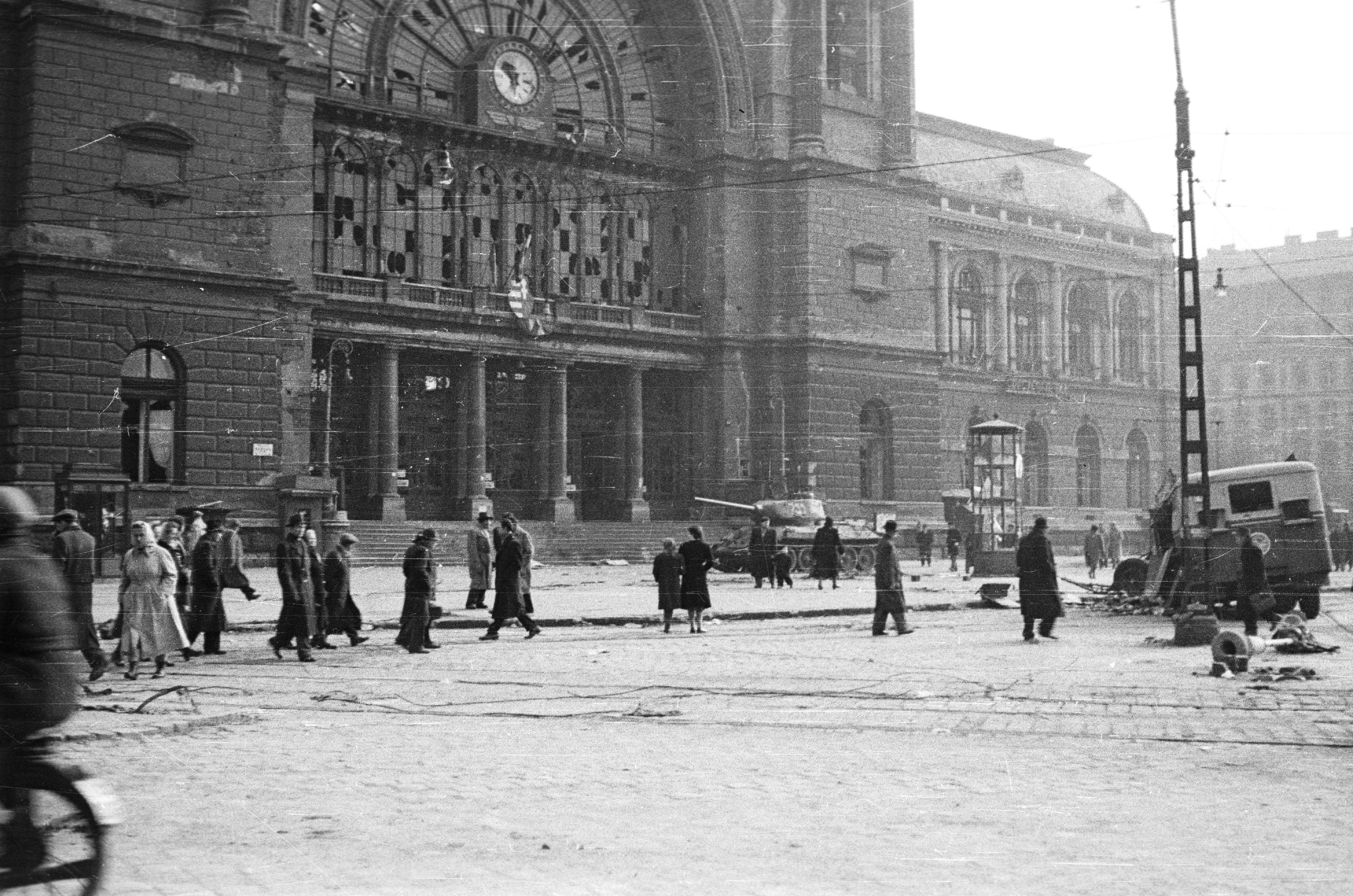 Baross tér, Keleti pályaudvar. Location: Hungary, Budapest VIII. Tags: tank, train station, phone booth, Soviet brand, war damage, crest, Budapest, revolution Title: Baross tér, Keleti pályaudvar.